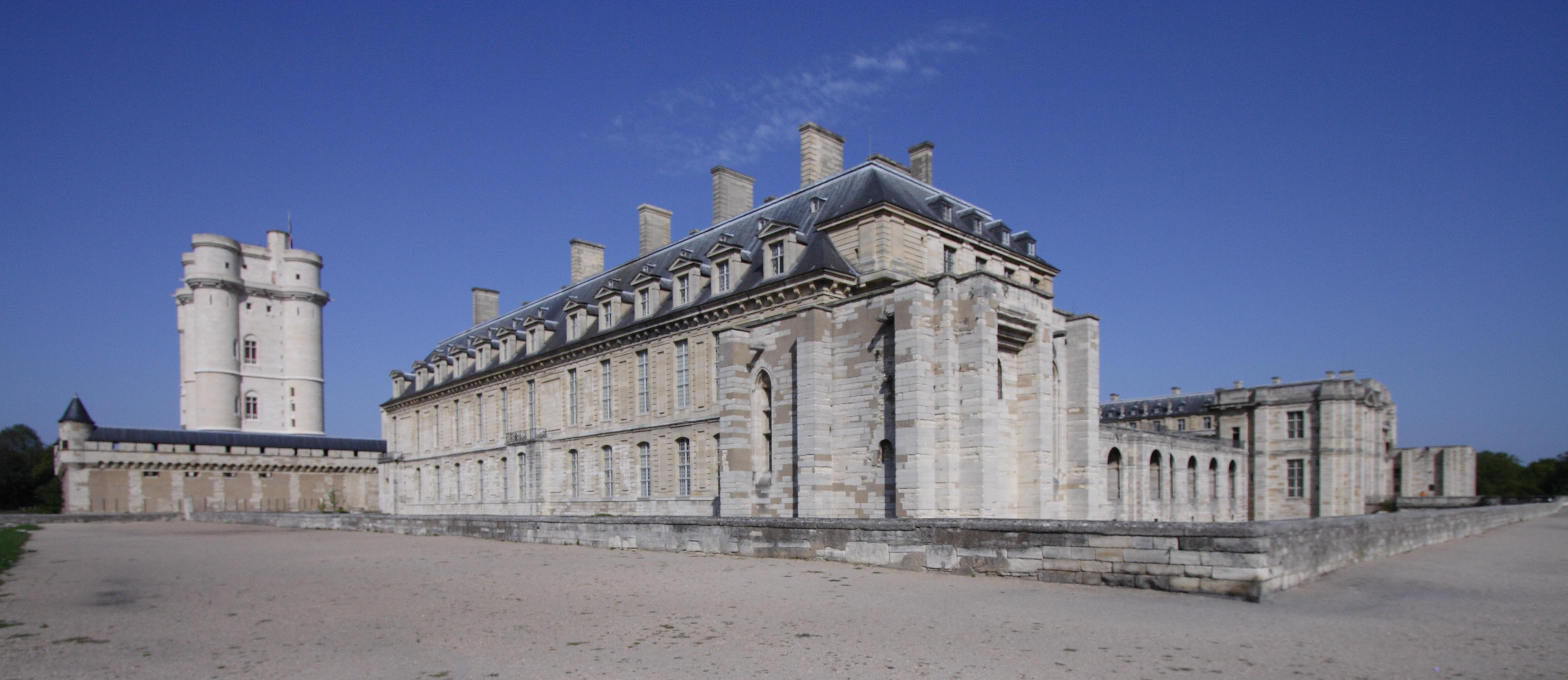 Château de Vincennes (Paris, France)